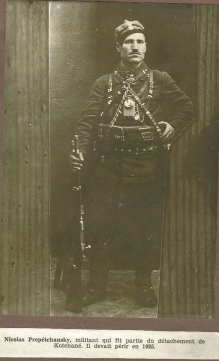 Nikola Prepechanski IMRO